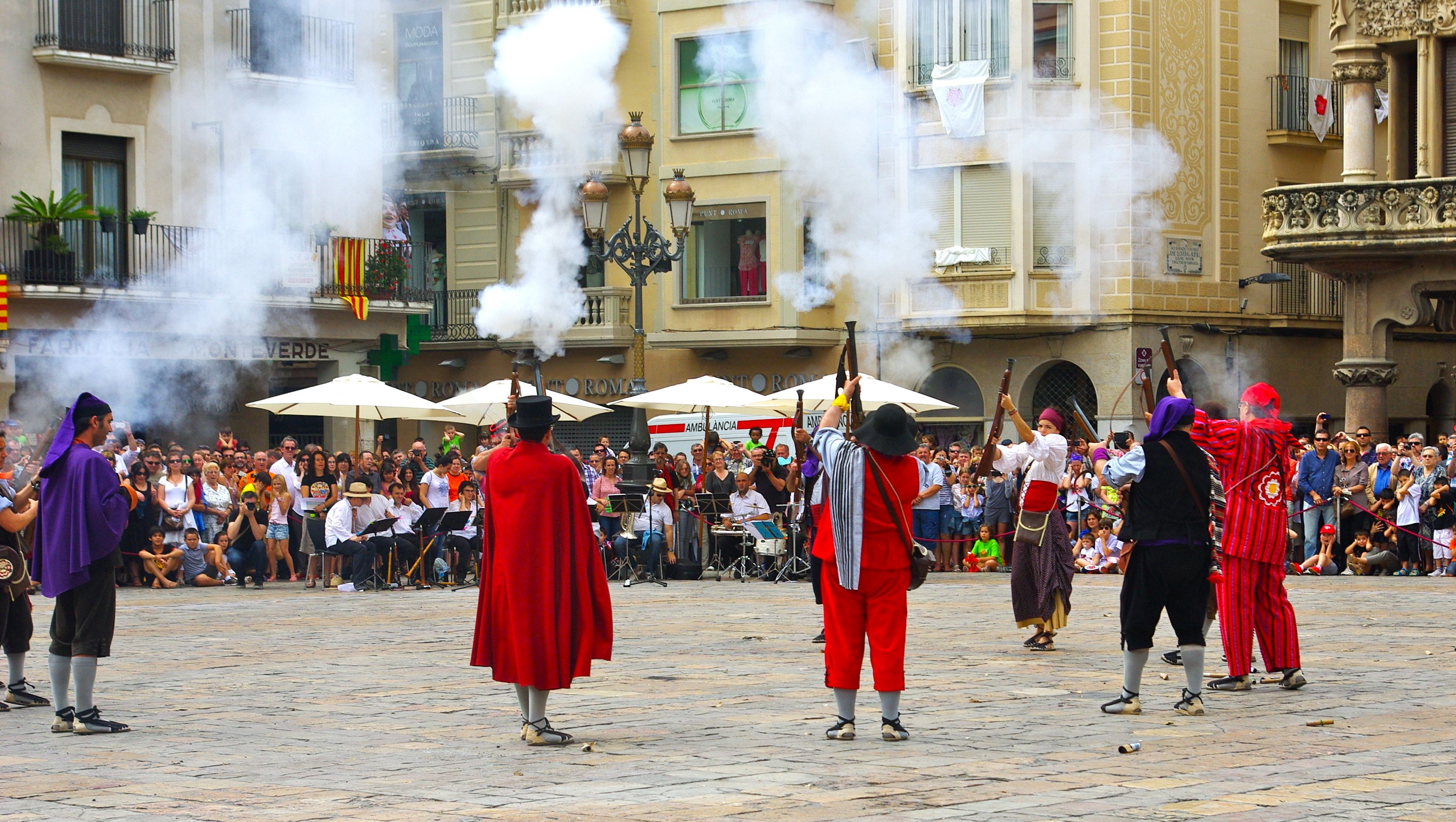 Ball del Carrasclet. Festa Major de Reus. 2014